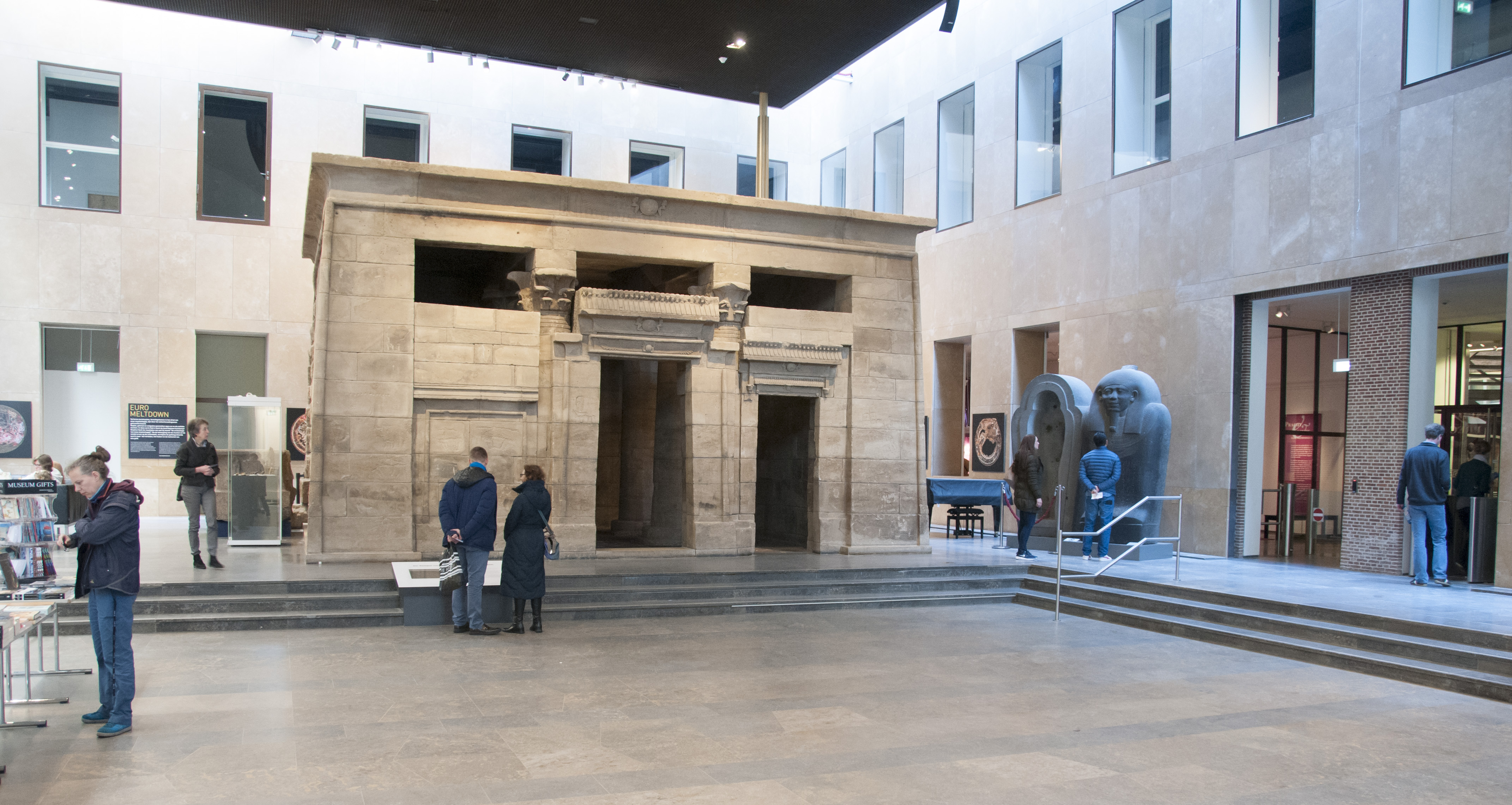 Entreehal van het Rijksmuseum van Oudheden met de Taffeh-tempel.